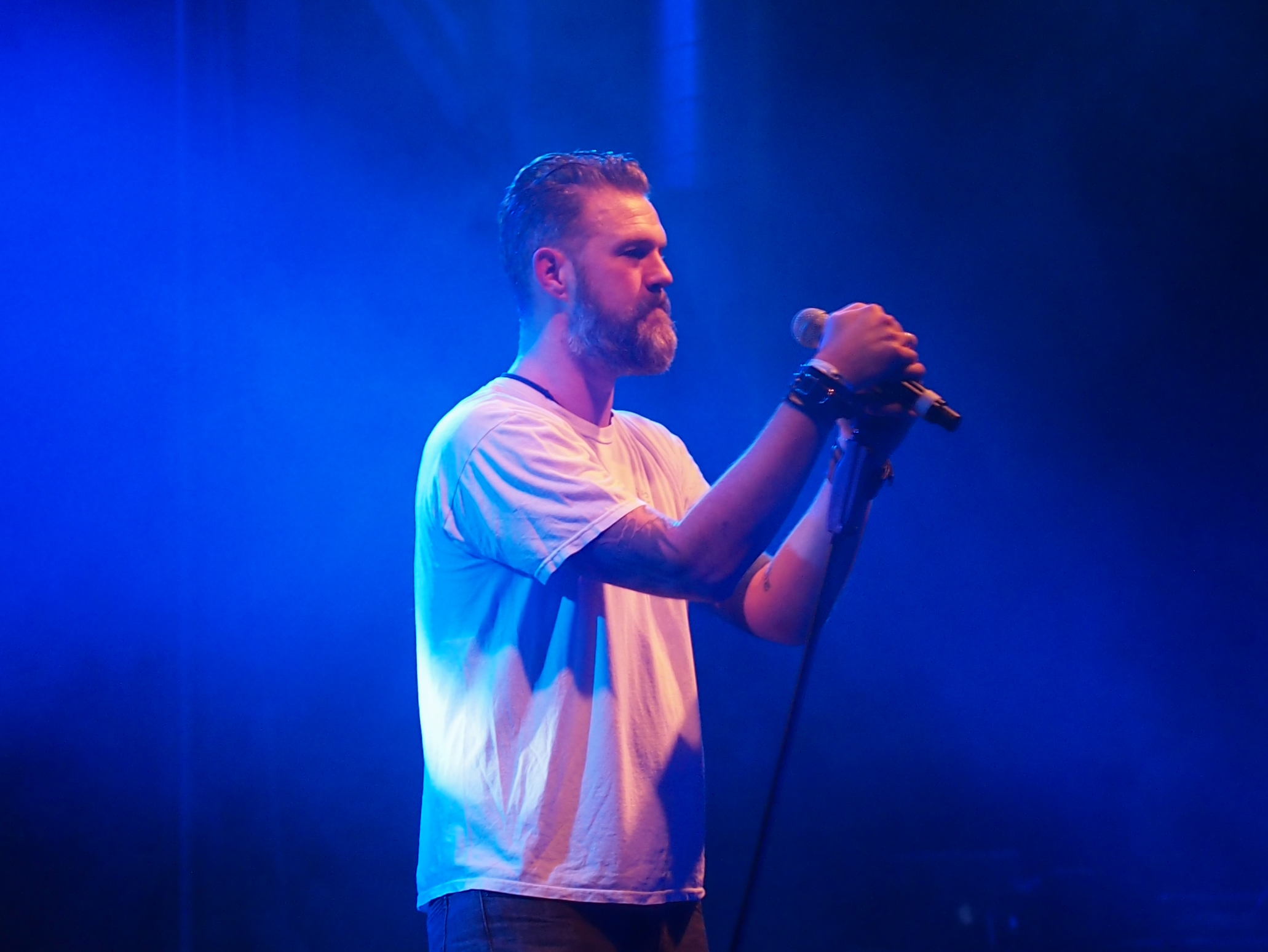 Pouppée Fabrikk auf dem E-Tropolis-Festival 2014 Festivalsommer This photo was created with the support of donations to Wikimedia Deutschland in the context of the CPB project "Festival Summer". This file is made available under the Creative Commons CC0 1.0 Universal Public Domain Dedication. The person who associated a work with this deed has dedicated the work to the public domain by waiving all of their rights to the work worldwide under copyright law, including all related and neighboring rights, to the extent allowed by law. You can copy, modify, distribute and perform the work, even for commercial purposes, all without asking permission. Thomas Springer Personality rights warningAlthough this work is freely licensed or in the public domain, the person(s) shown may have rights that legally restrict certain re-uses unless those depicted consent to such uses. In these cases, a model release or other evidence of consent could protect you from infringement claims.